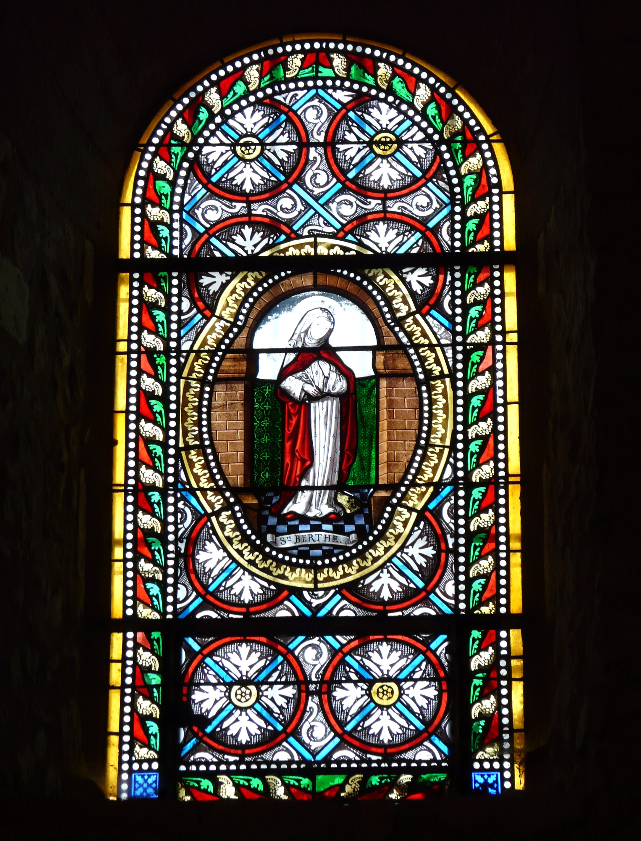 Vitrail représentant sainte Berthe, église Saint-Martin, Antonne-et-Trigonant, Dordogne, France